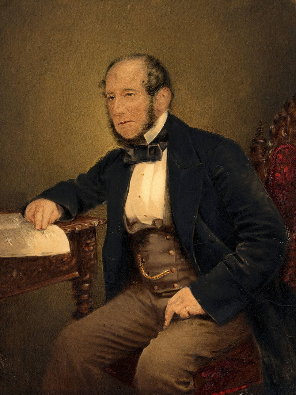 Ге́нри А́дамс (англ. Henry Adams; 1813, Госпорт, Англия — 1877, там же) — английский натуралист и конхиолог.